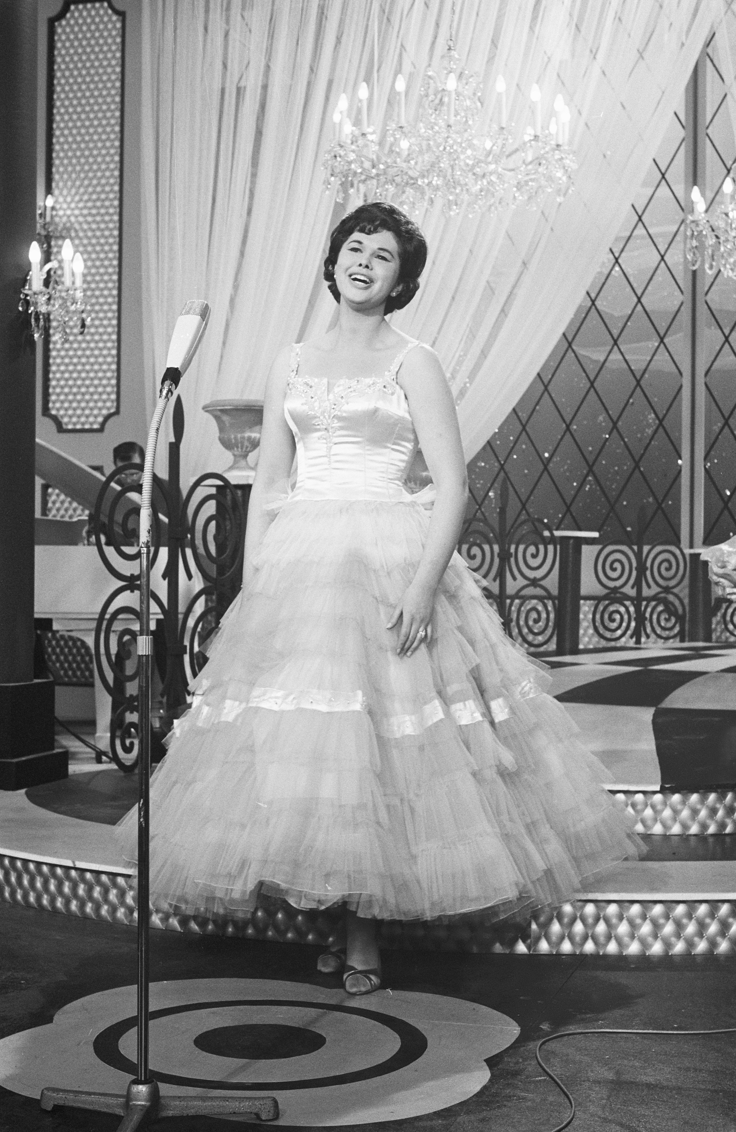 Collectie / Archief : Fotocollectie Anefo Reportage / Serie : [ onbekend ] Beschrijving : Eurovisie Songfestival 1962 te Luxemburg, voor Oostenrijk Eleonore Schwarz Datum : 18 maart 1962 Locatie : Luxemburg, Oostenrijk Trefwoorden : artiesten, songfestivals Persoonsnaam : Schwarz Eleonore Fotograaf : Pot, Harry / Anefo Auteursrechthebbende : Nationaal Archief Materiaalsoort : Negatief (zwart/wit) Nummer archiefinventaris : bekijk toegang 2.24.01.05 Bestanddeelnummer : 913-6597